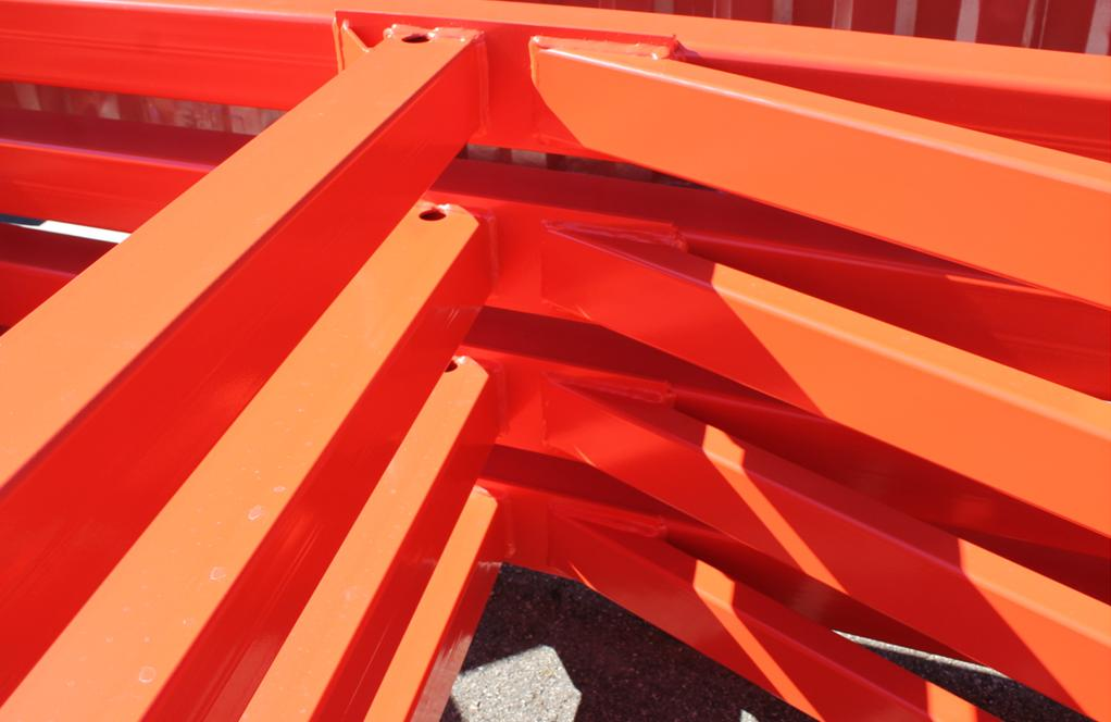 Feuerverzinkte und anschließend pulverveschichtete Stahlbauteile